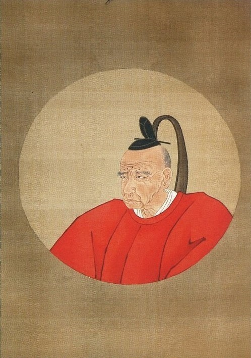 久須美祐明の肖像。